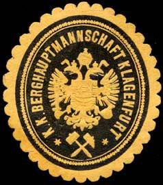 Sealing stamp Title: K.K. Berghauptmannschaft Klagenfurt Description: gelb, schwarz, geprägt Place: Klagenfurt size: 5x4 cm